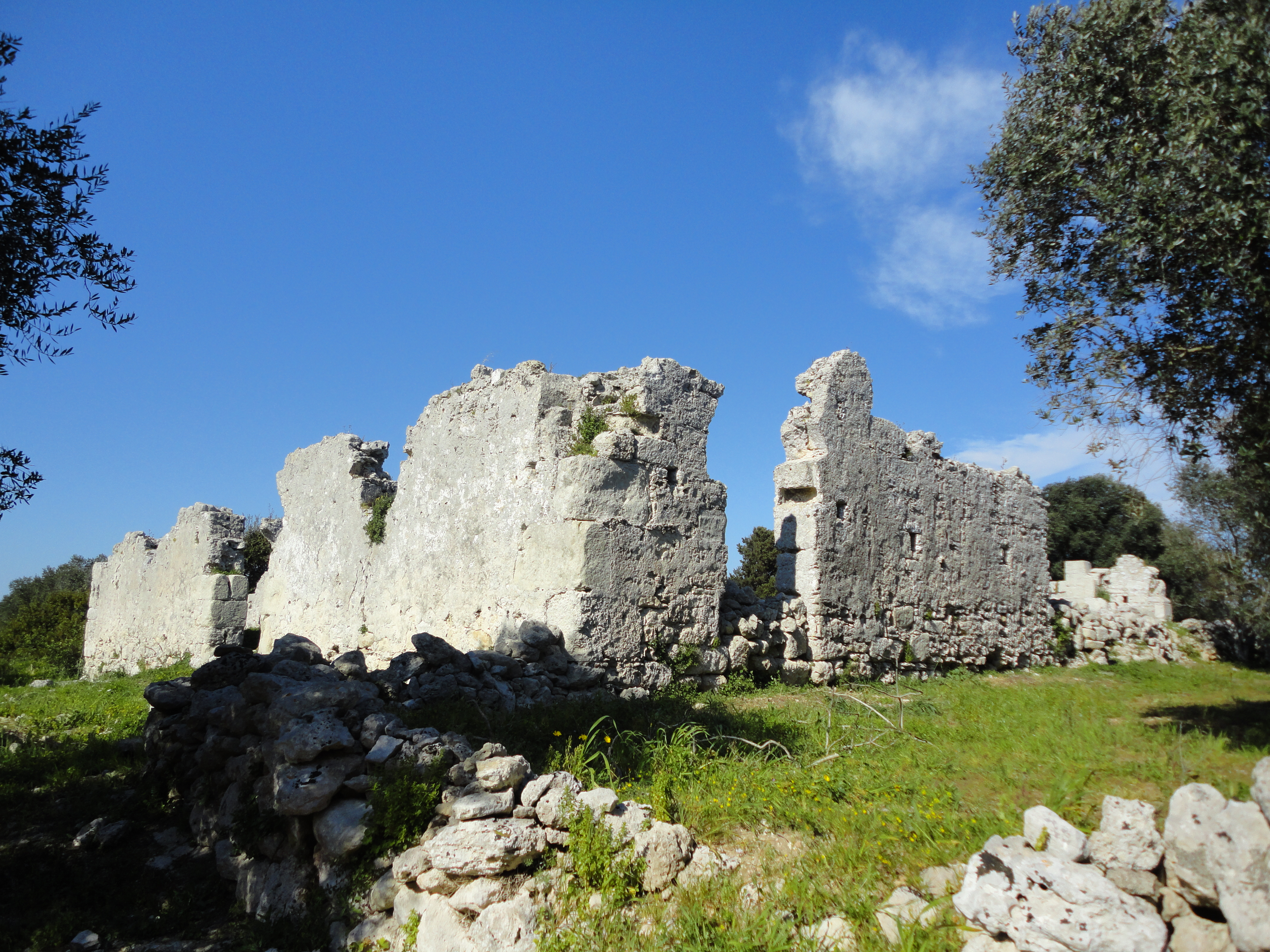 Abbazia delle Centoporte di Giurdignano